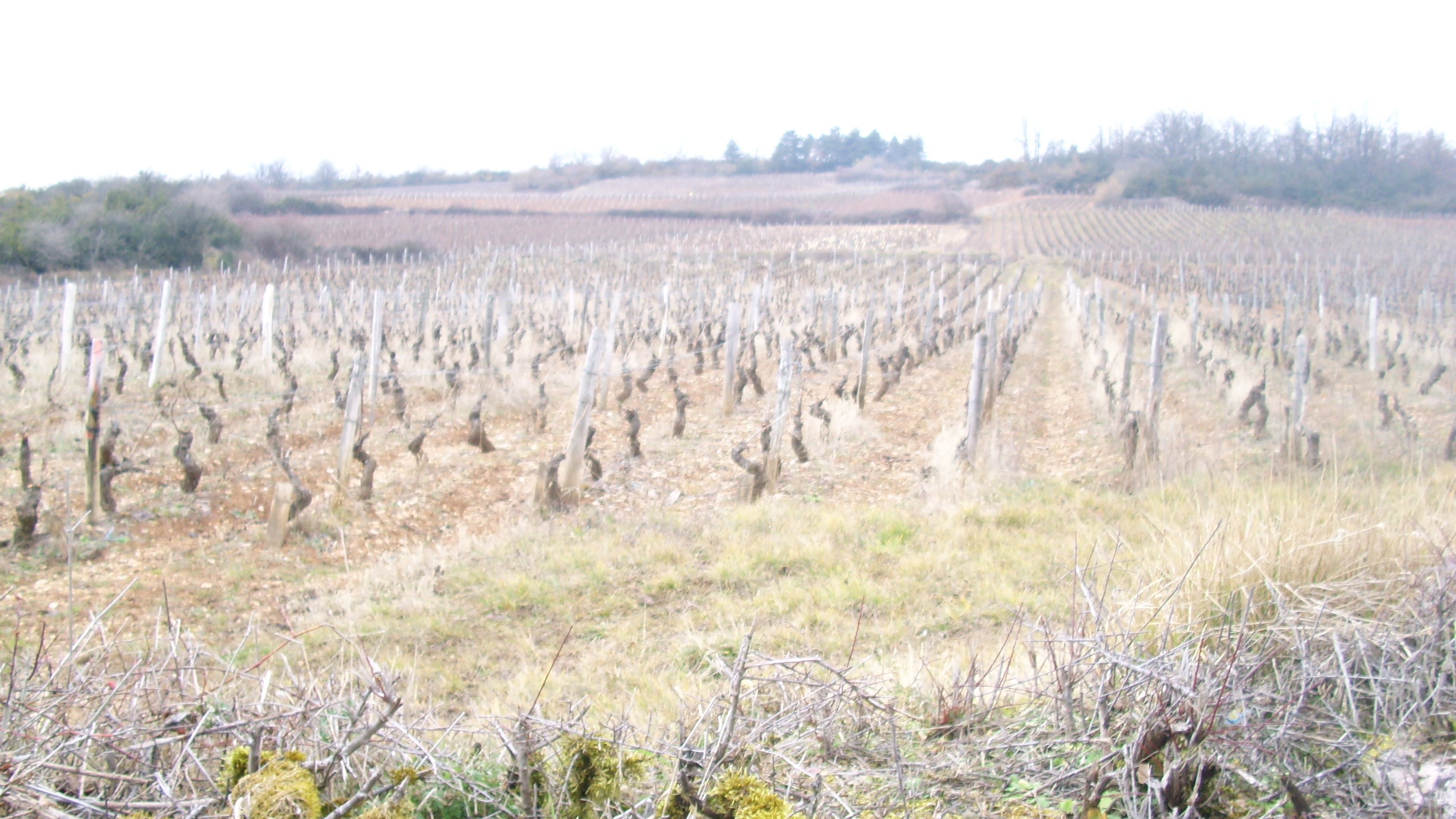 Vue de la Chagnée